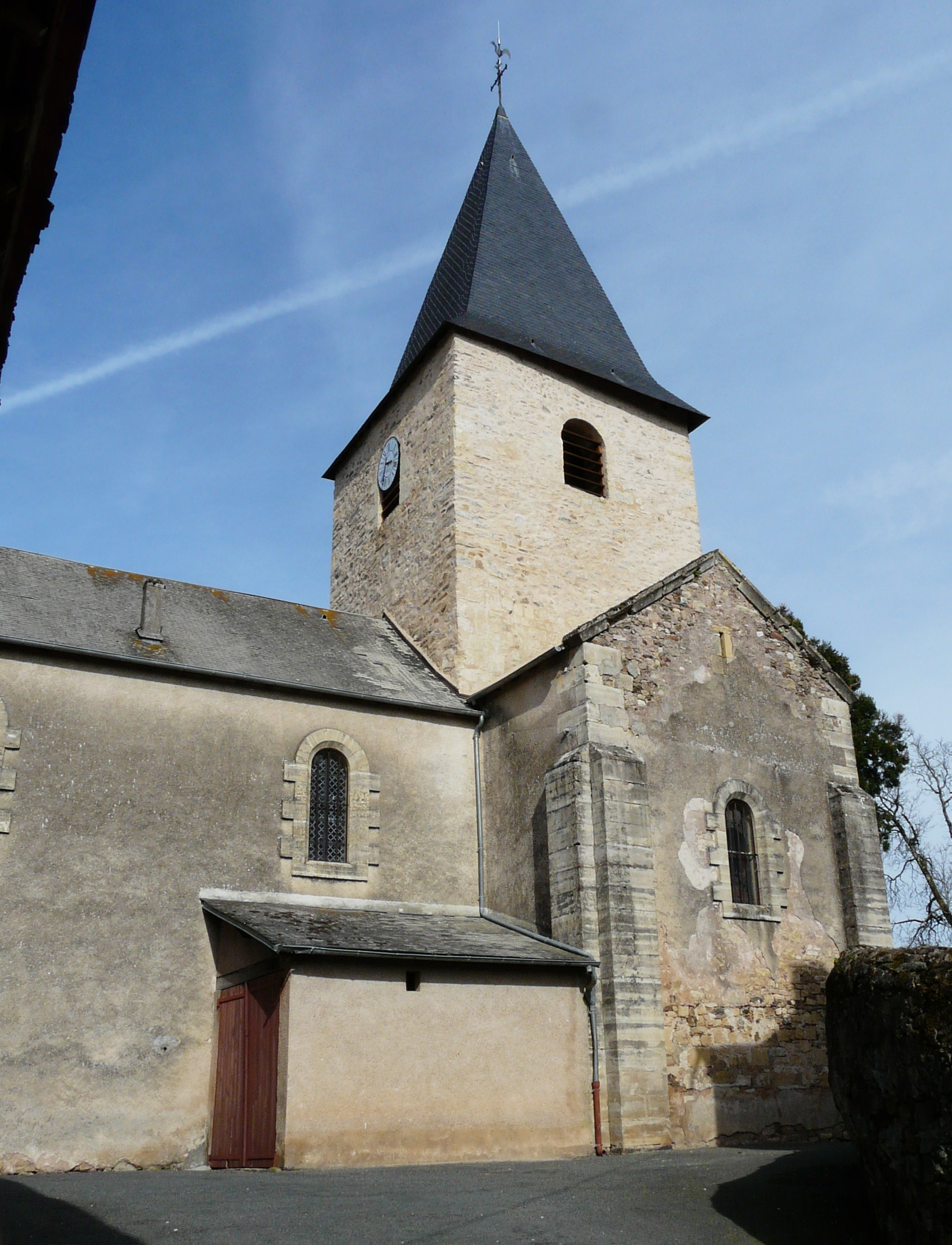 L'église Notre-Dame de la Nativité, Génis, Dordogne, France